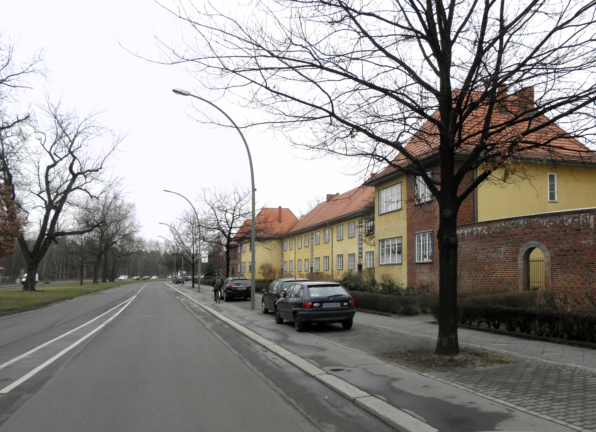 (Straße) An der Wuhlheide in Oberschöneweide